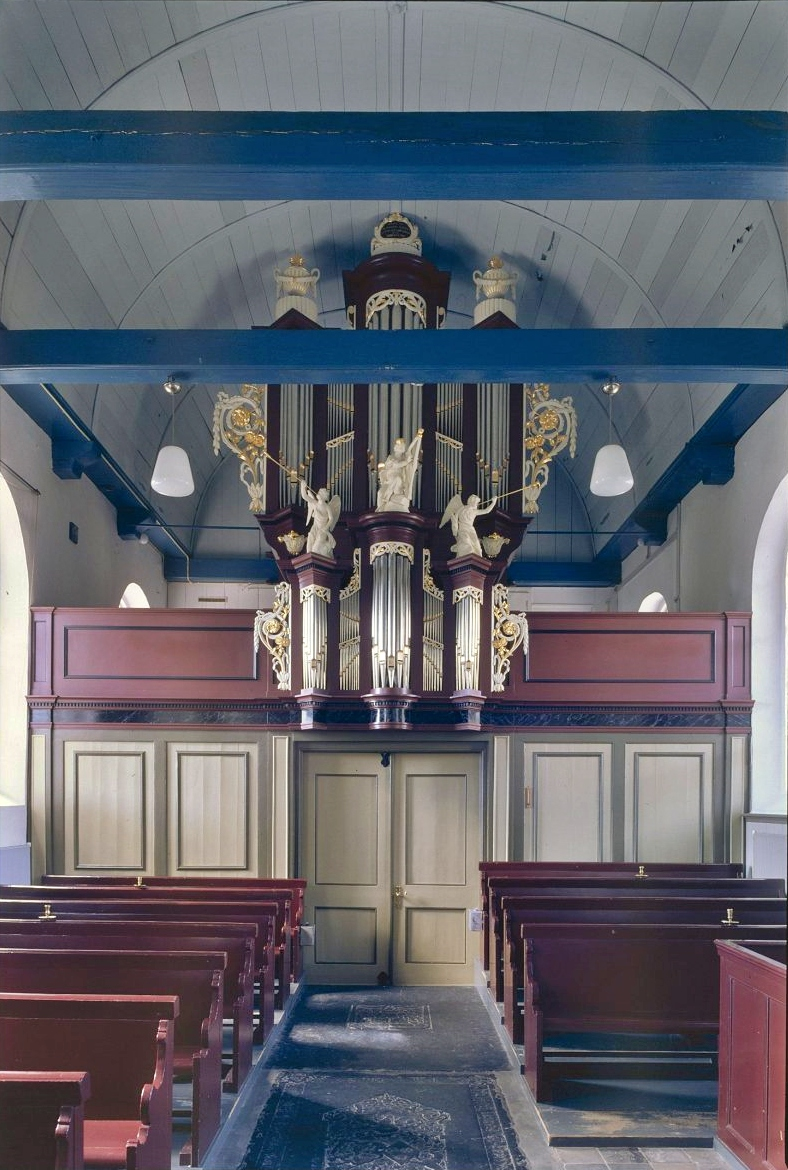 Nederlands Hervormde Kerk: Interieur, aanzicht orgel, orgelnummer 964 (opmerking: Gefotografeerd voor Het Historische Orgel in Nederland 1819-1840, bladzijde 50)